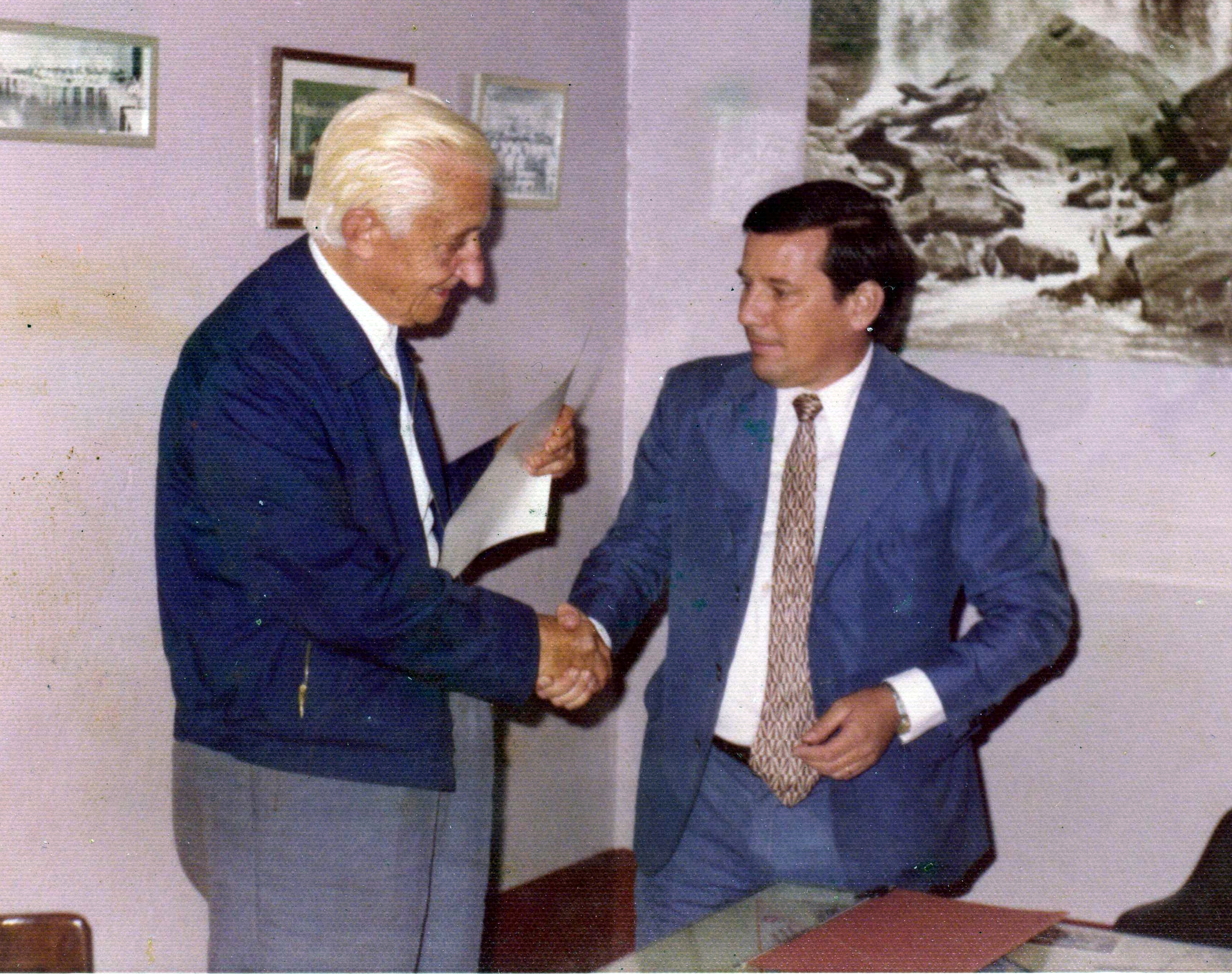 Héctor Horacio Dalmau, intendente de Campo Ramón (Provincia de Misiones) recibe en su despacho al Presidente de Argentina, Arturo Illia, durante su visita a la provincia.